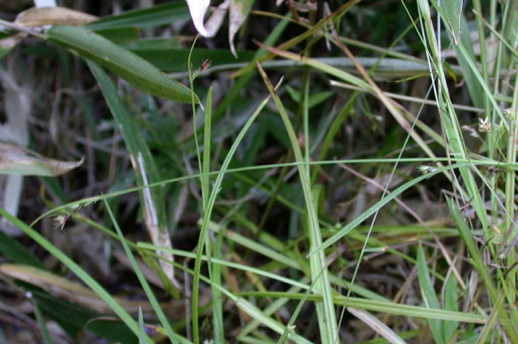 コシンジュガヤ （シンジュガヤ属：カヤツリグサ科） 2003.10.01 日本、和歌山県白浜町 Shirahama t. Wakayama pref. Japan.